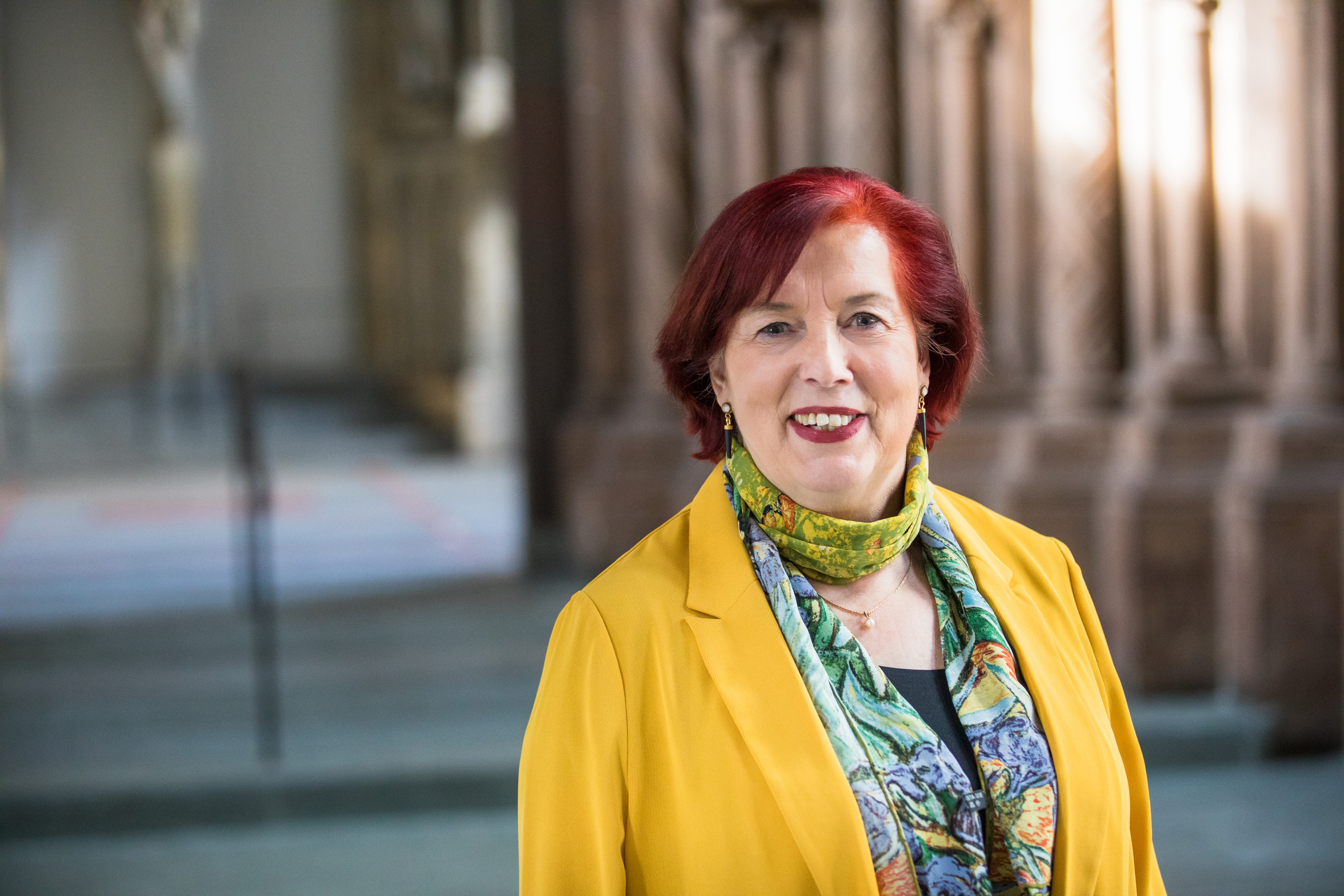 Christiane Lemke am Minda de Gunzburg Center for European Studies an der Harvard University - März 2019